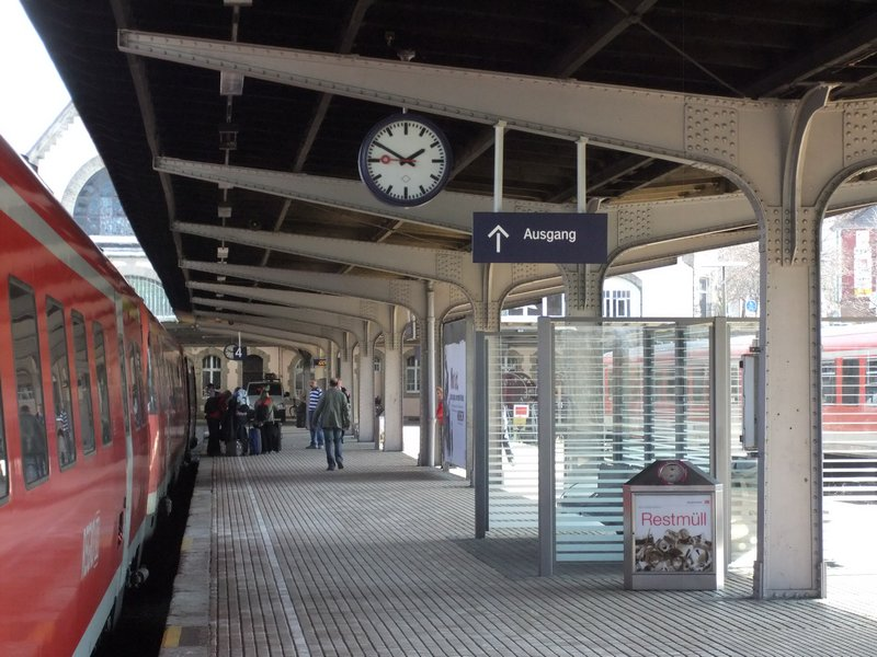 Bahnsteig 4 im Bahnhof Bad Harzburg